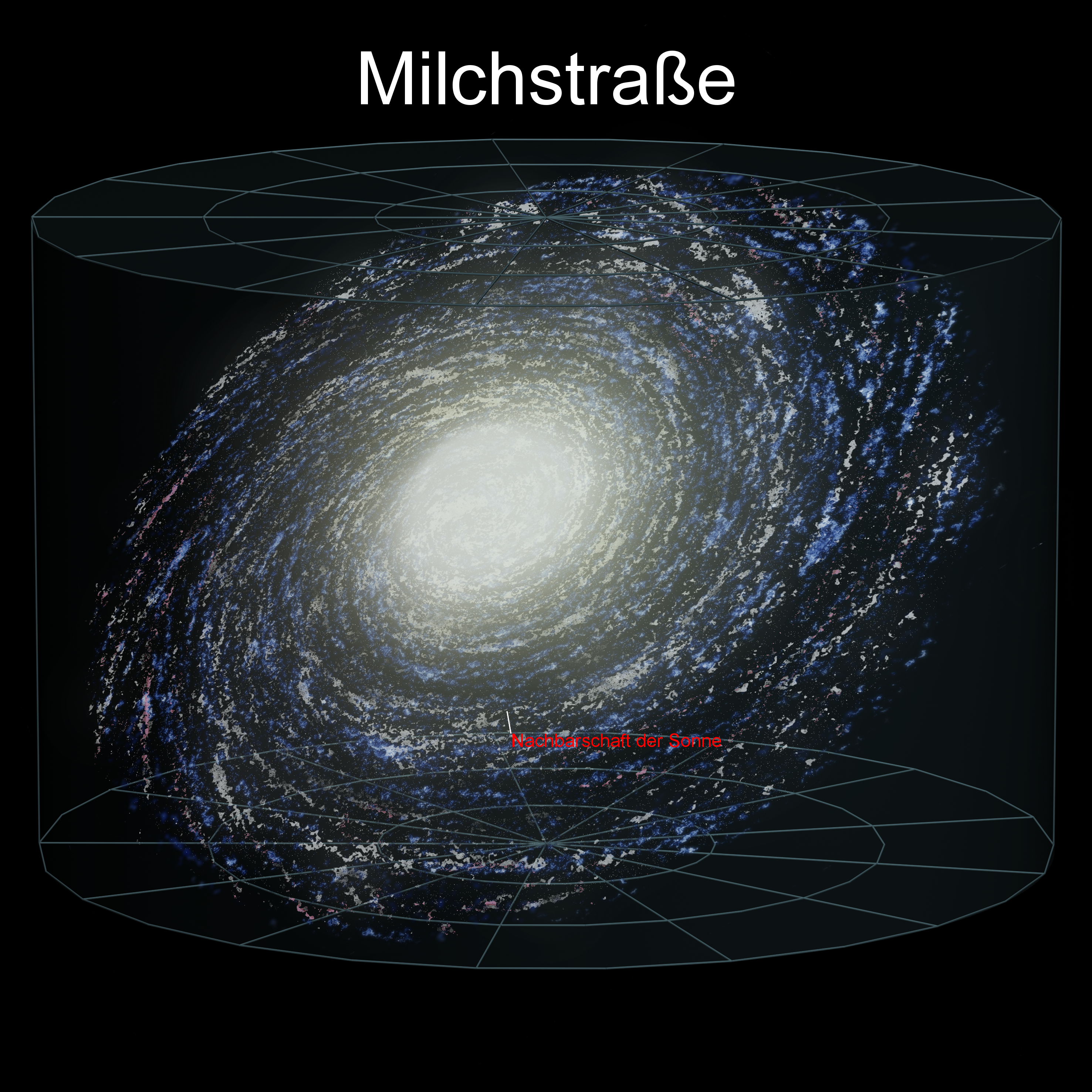 Ausblick ins Universum – Die Milchstraße Ein Mosaik mit allen Bildern findet man hier der Erde im Universum 4x2.png